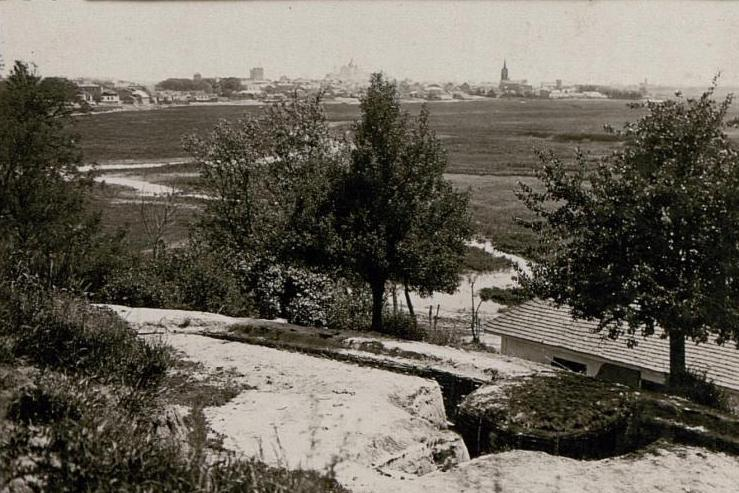 Stellung am Styr bei Luck